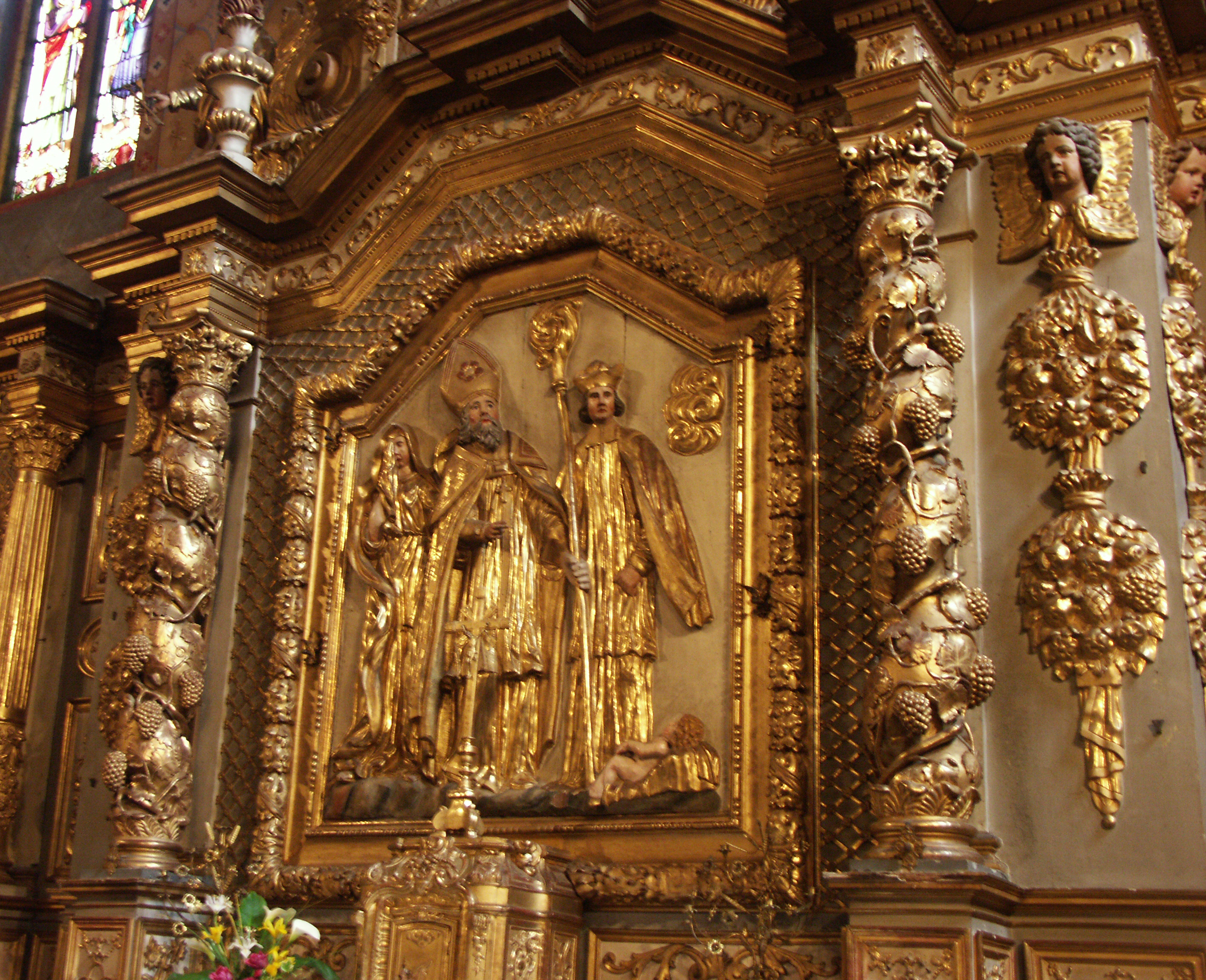 Eglise St Martin de Vic-en-Bigorre : retable en bois de noyer exécuté par Simon Boysson. Saint-Martin ressuscite un enfant à ses pieds.